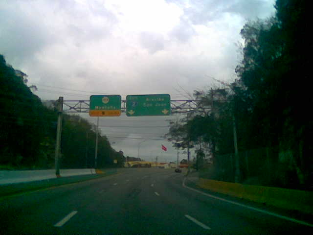 PR-2 Aguadilla